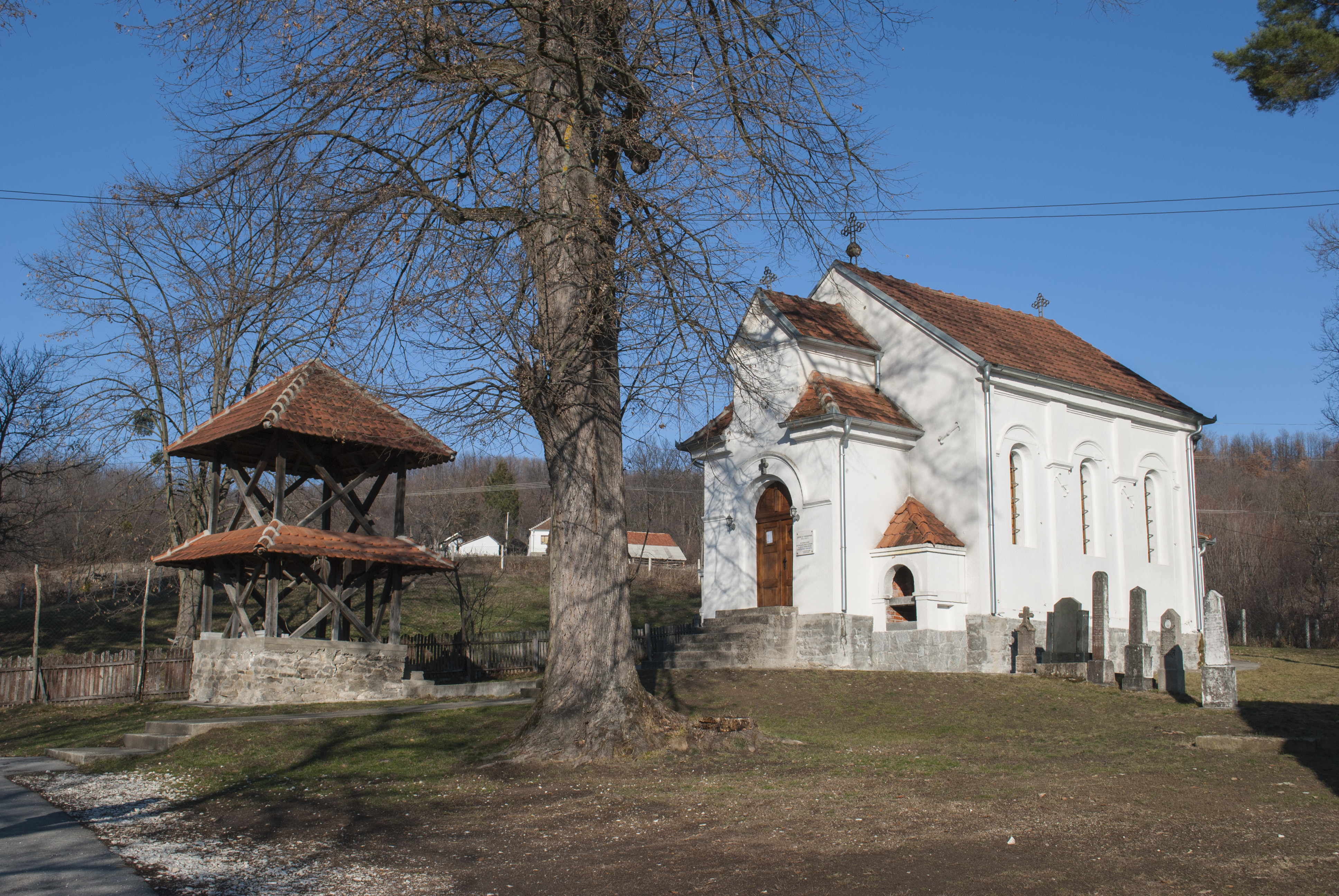 Crkva sa kraja 19. veka